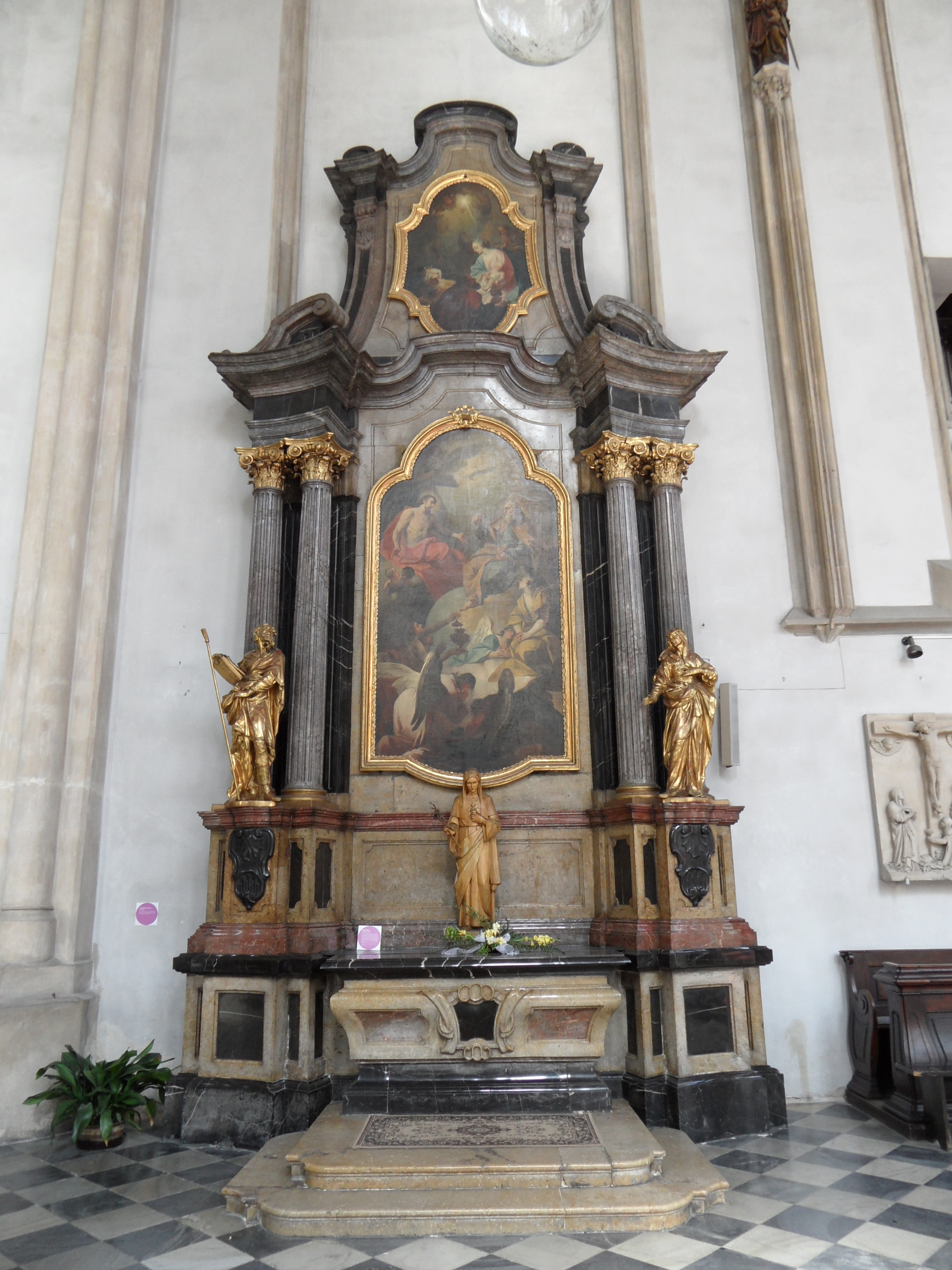 Oltář Nejsvětější Trojice - kostel sv. Jakuba, Brno